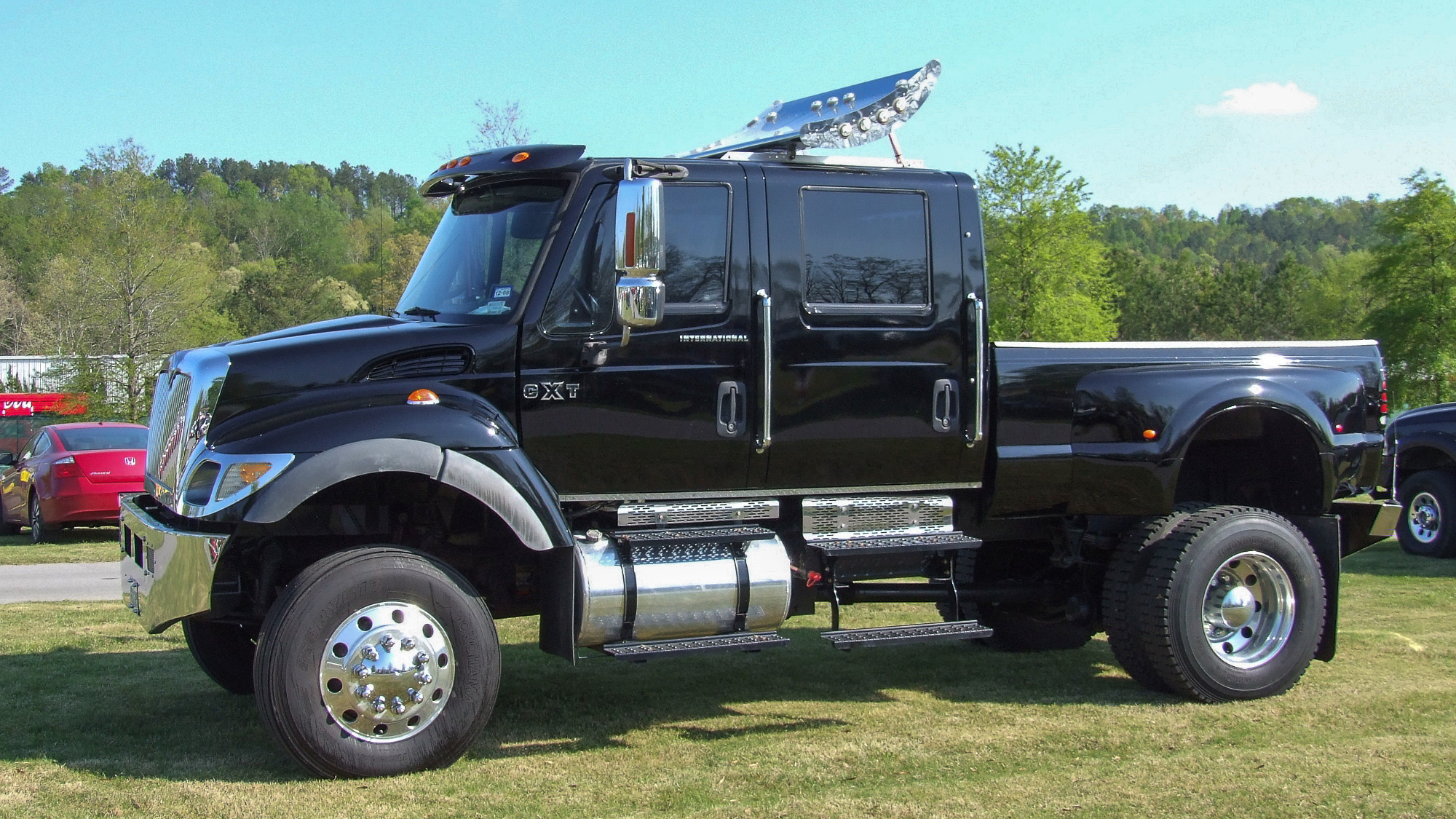 Ein International CXT (Commercial Extreme Truck) Pickup Truck.